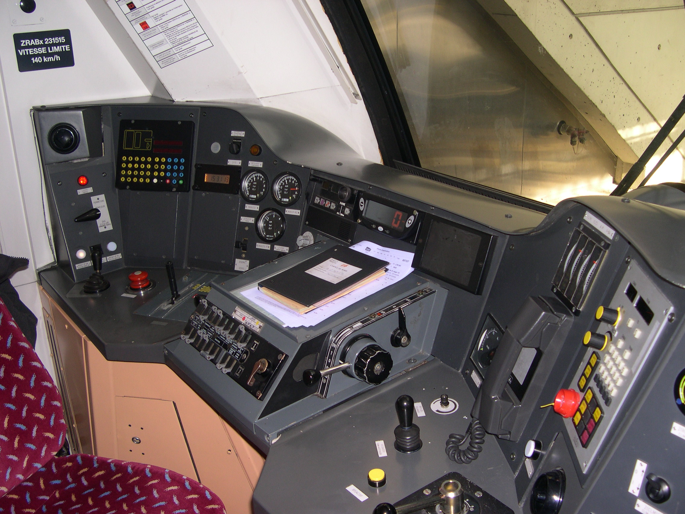 Poste de conduite TER 2N PG Z23500